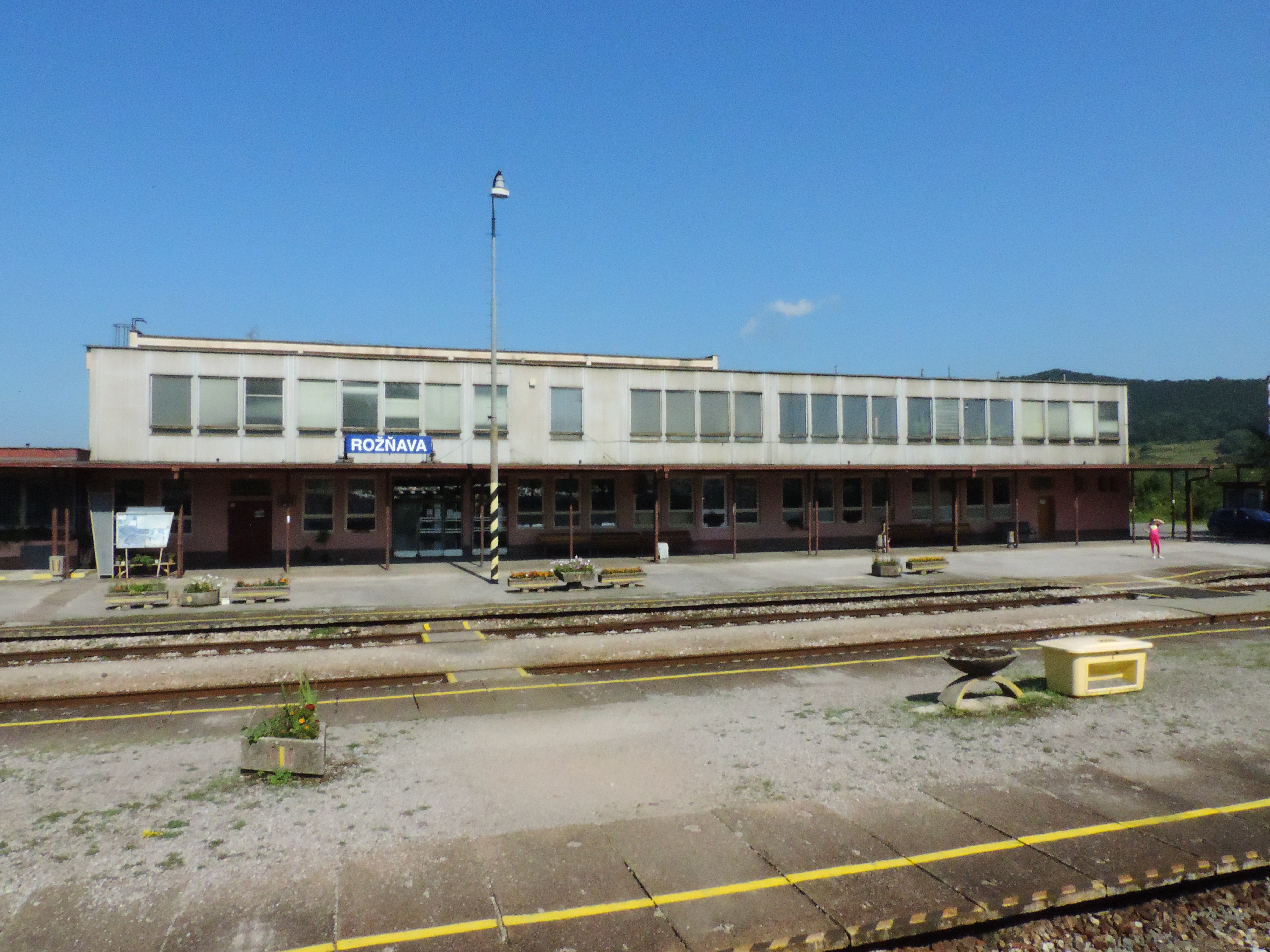 Rožňava - železničná stanica